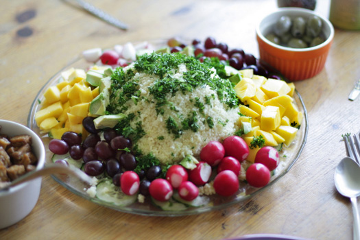 couscous salad